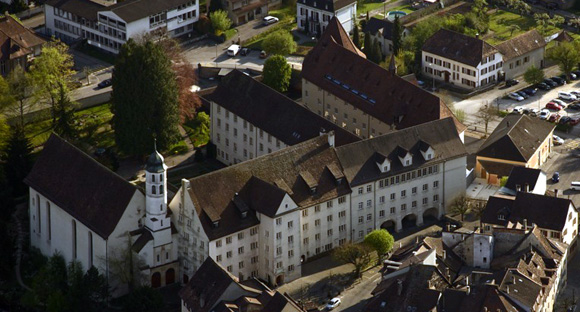 photo vue du ciel du LCP